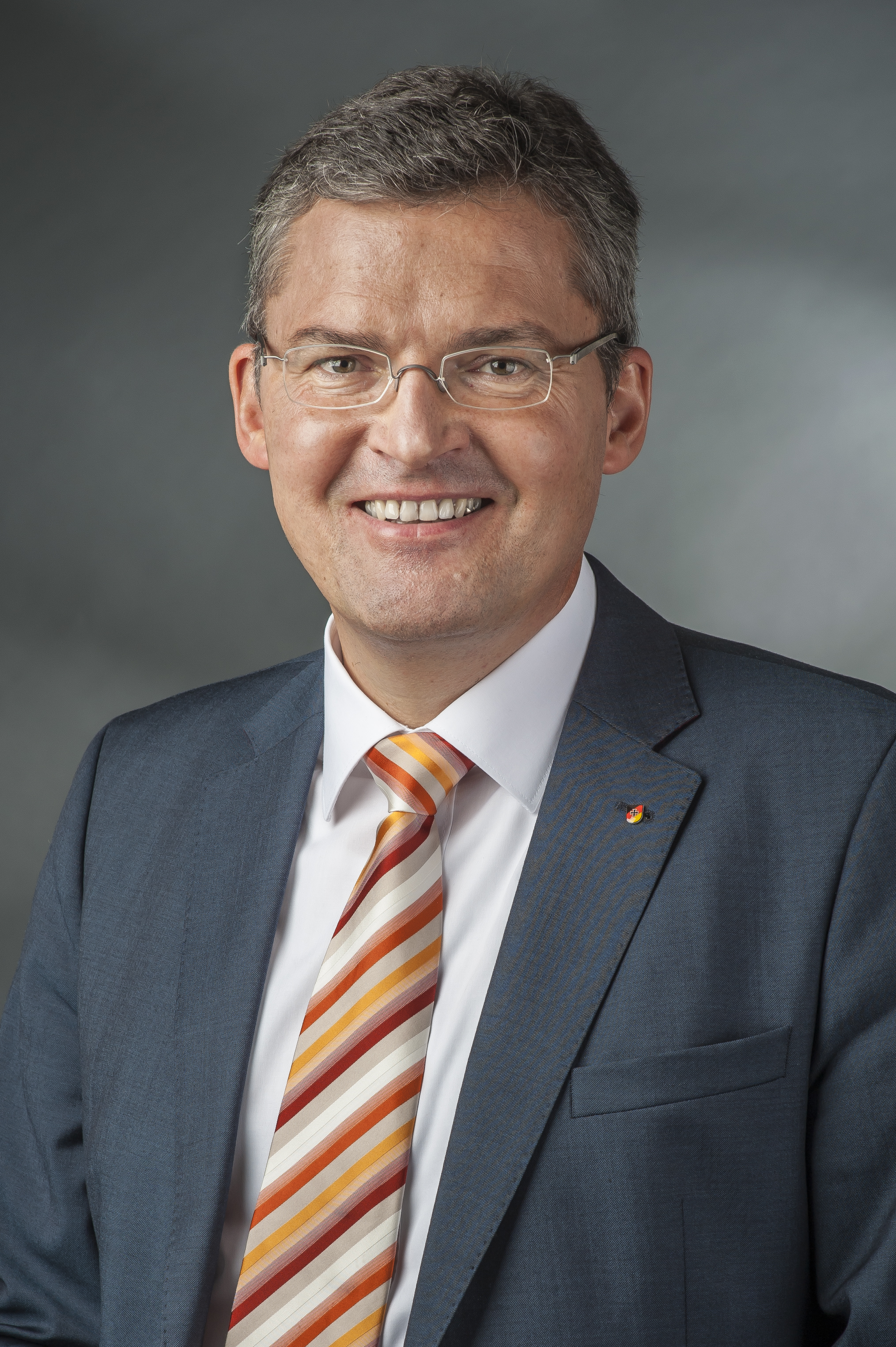 Roderich Kiesewetter (* 11. September 1963 in Pfullendorf) ist ein deutscher Politiker (CDU) und ehemaliger Generalstabsoffizier (Oberst a.D.) der Bundeswehr.